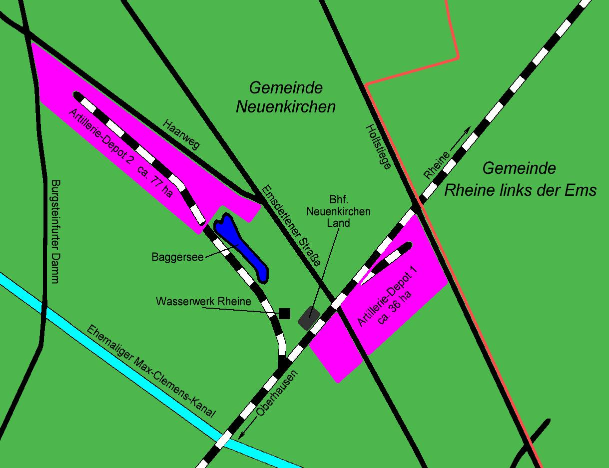 Zeichnung u. a. nach einer Kartenskizze von 1919